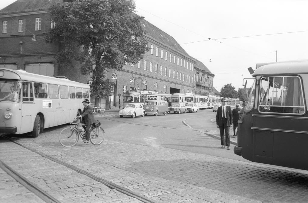 Wegen Massenandrang an der Fähre Holtenau durch der Sperrung der beschädigten Prinz-Heinrich-Brücke kommen zusätzliche Straßenbahnen und Busse zum Einsatz.